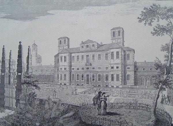 Facciata orientale di Villa Silva a Cinisello, in un'incisione di Marc'Antonio Dal Re.